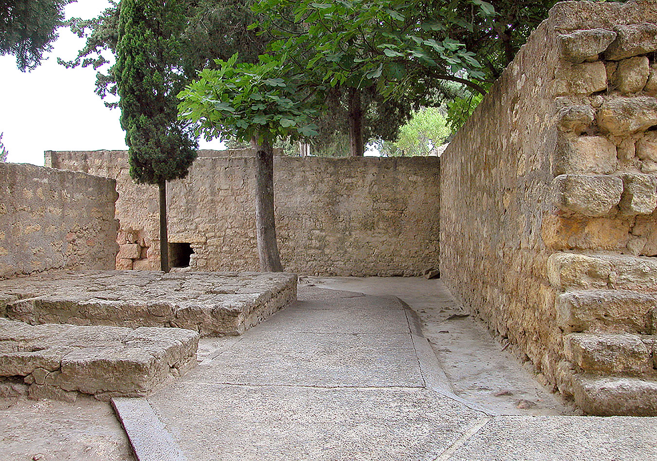 La Puerta Norte - Madinat al-Zahra